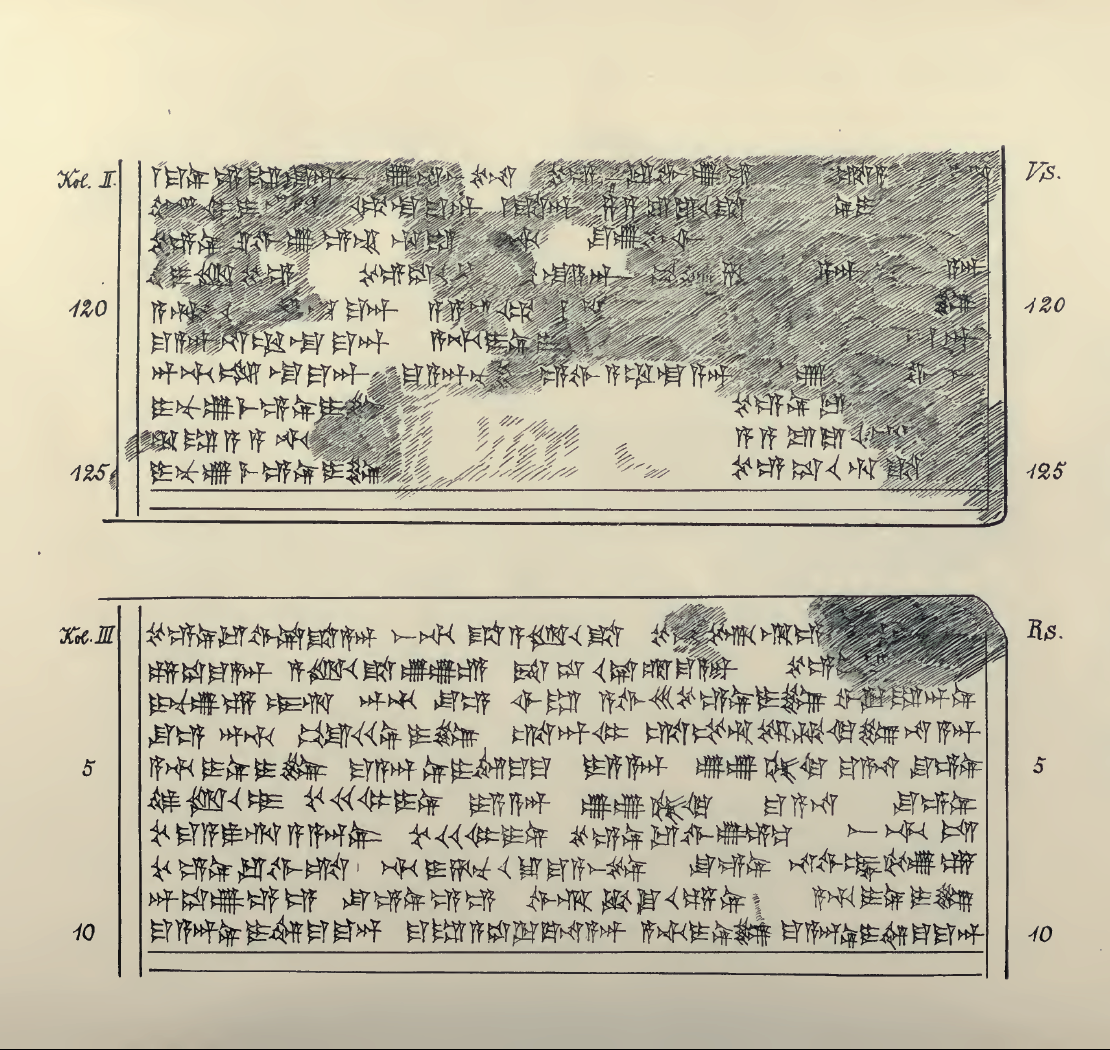 List Tuszratty do Amenhotepa III w języku huryckim – autografia.